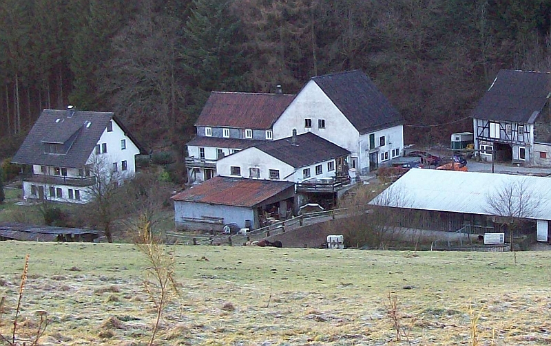 Rotbusch, Schmallenberg (Germany)